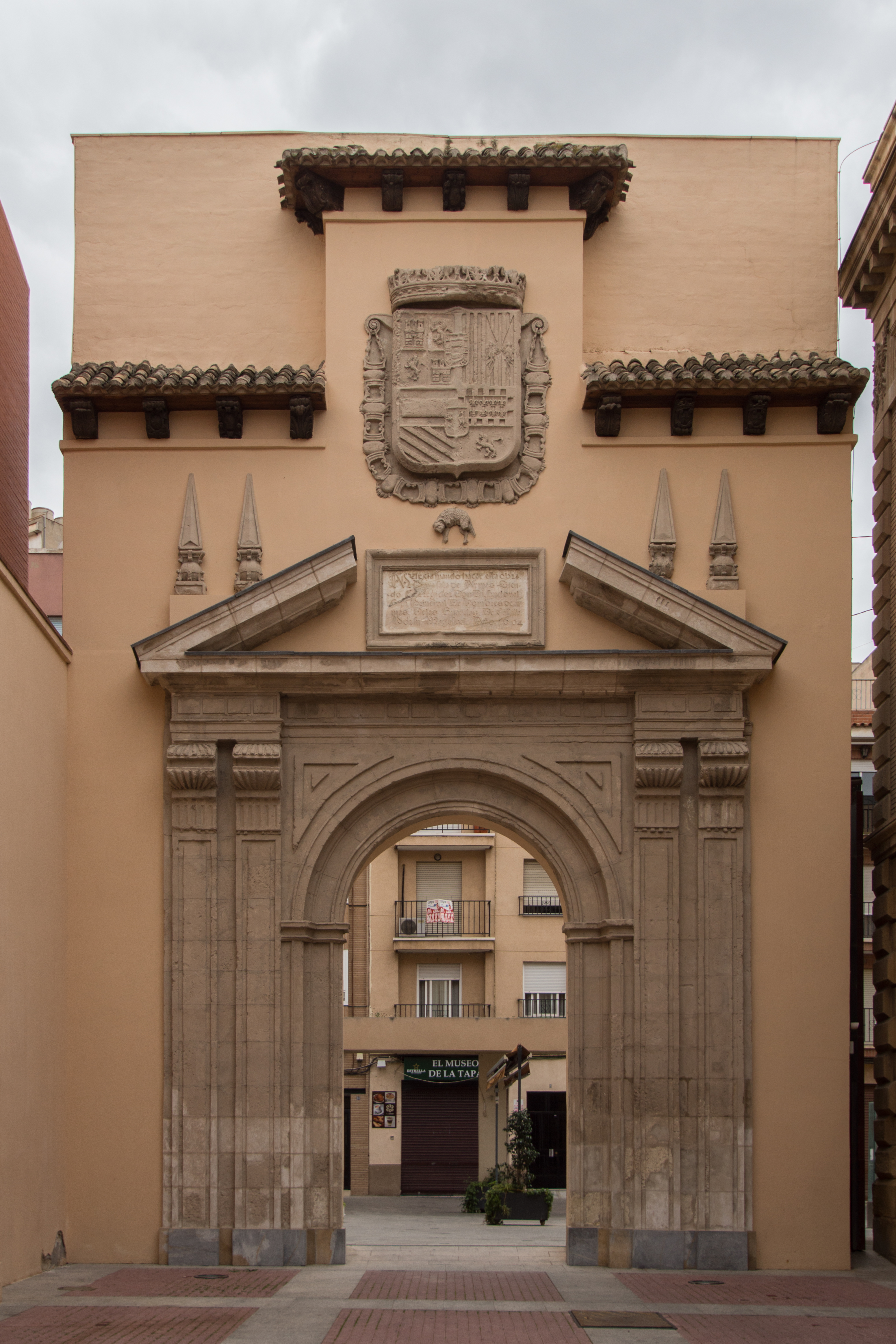 Puerta acceso a calle Joaquín Báguena